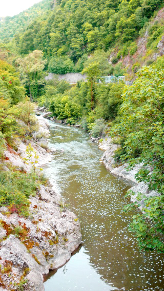 Ceppaloni (BN), Le gole del fiume Sabato presso la frazione Barba.